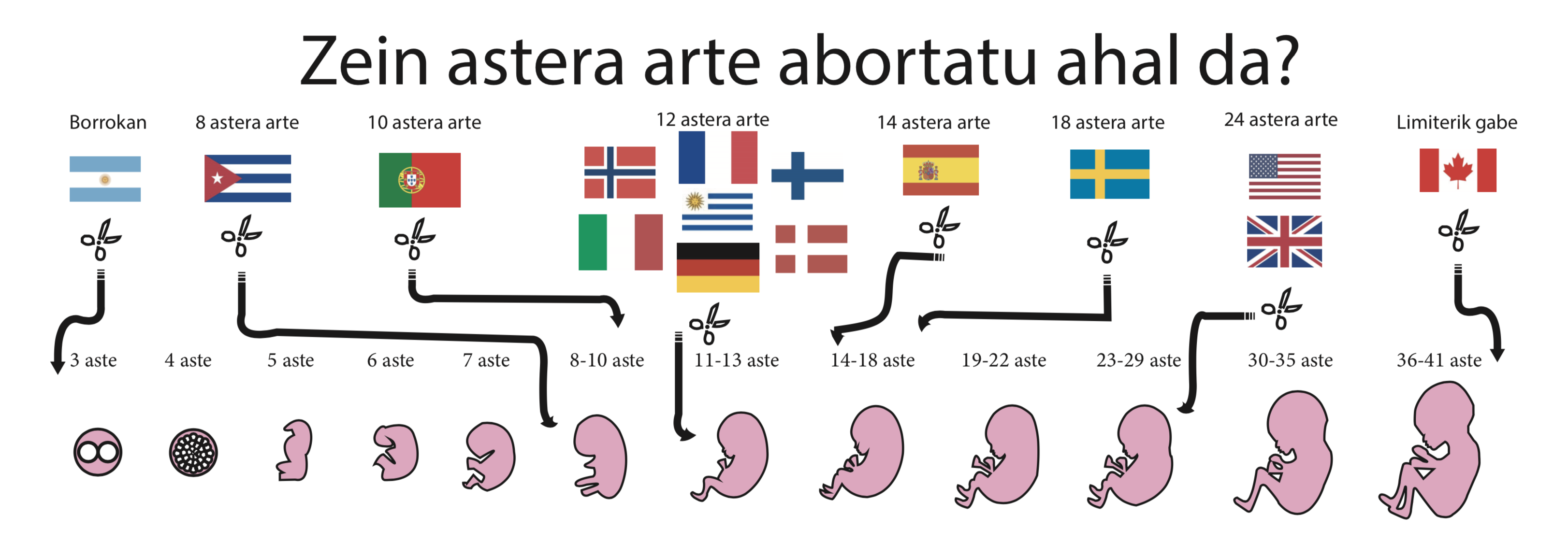 Zein astetan abortatu daitekeen munduko hainbat tokitan.